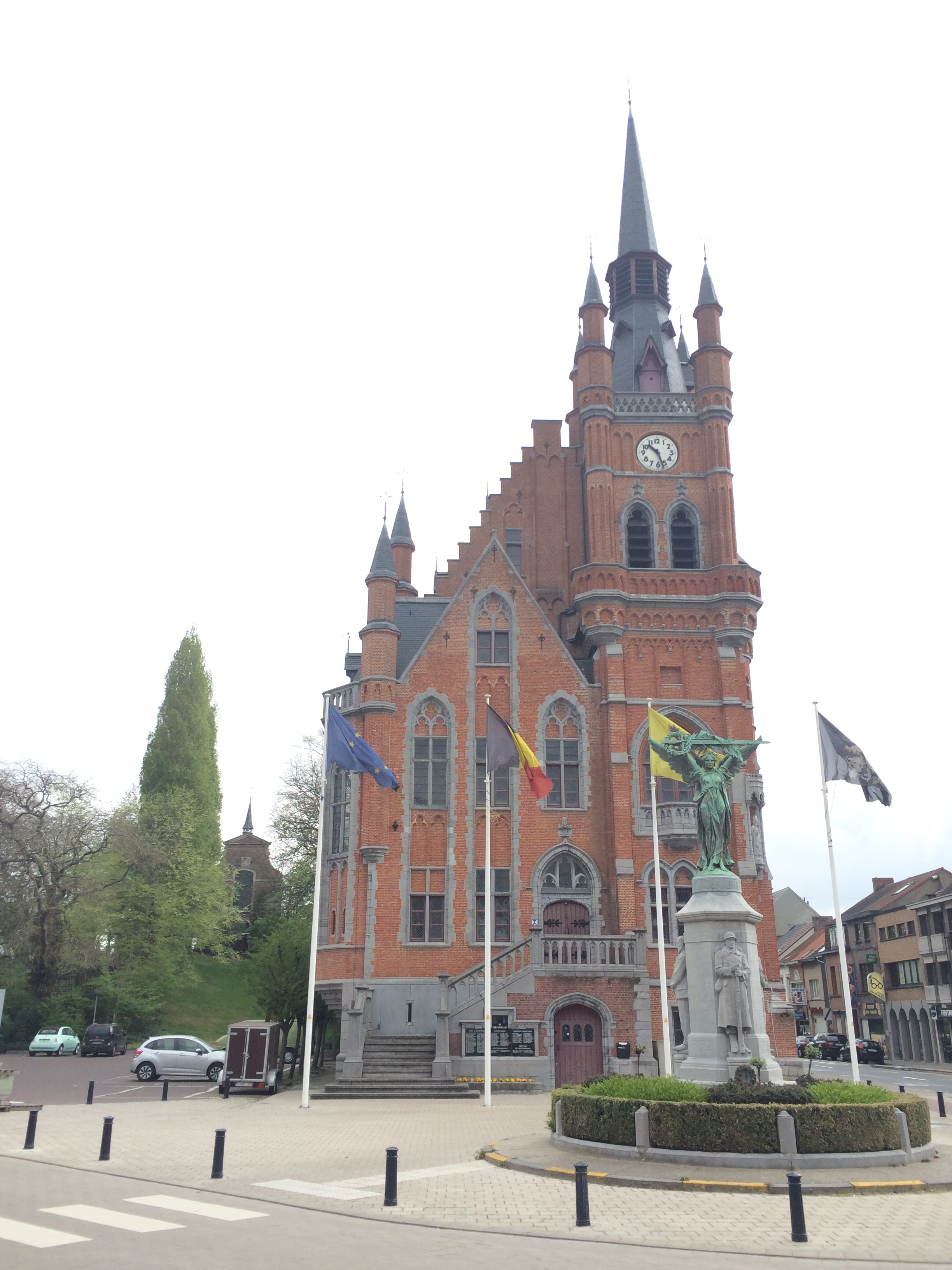 Het oude gemeentehuis van Sint-Amandsberg na de renovatie